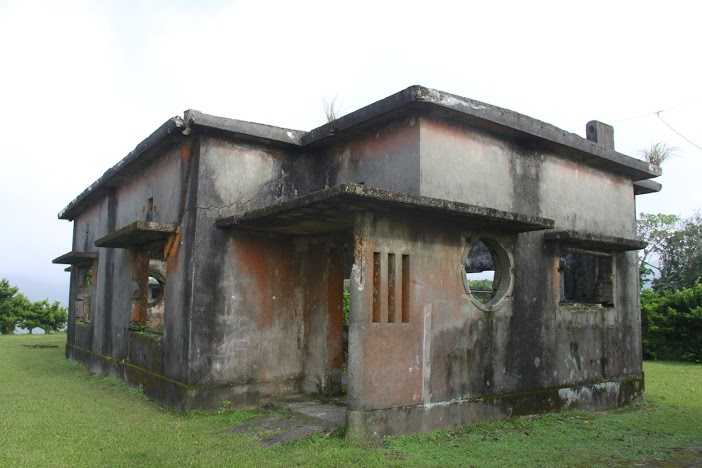 中文（台灣）: 台灣總督府氣象台紅頭嶼測候所(蘭嶼氣象站 舊建築)3